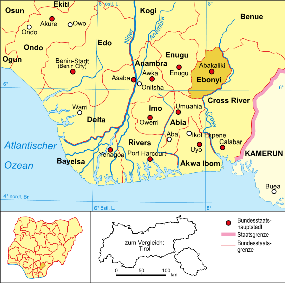 Politische Karte Nigerias (Bundesstaat Ebonyi hervorgehoben)